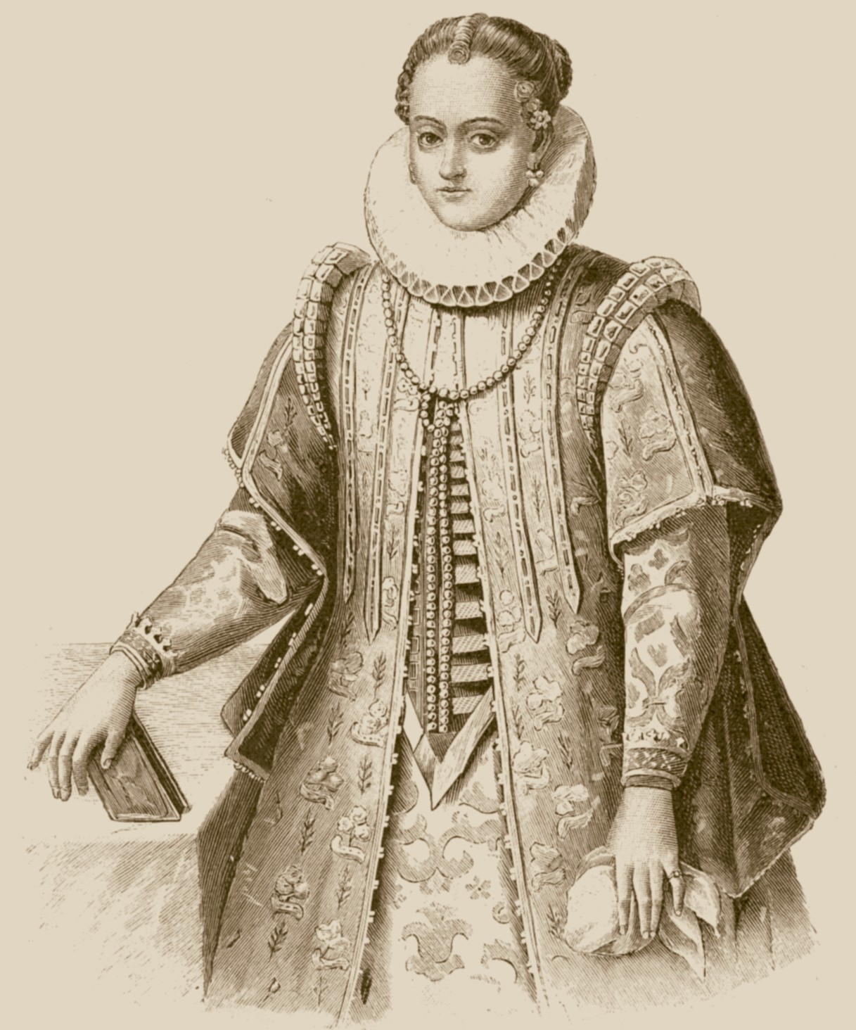 Eleonora d´Este